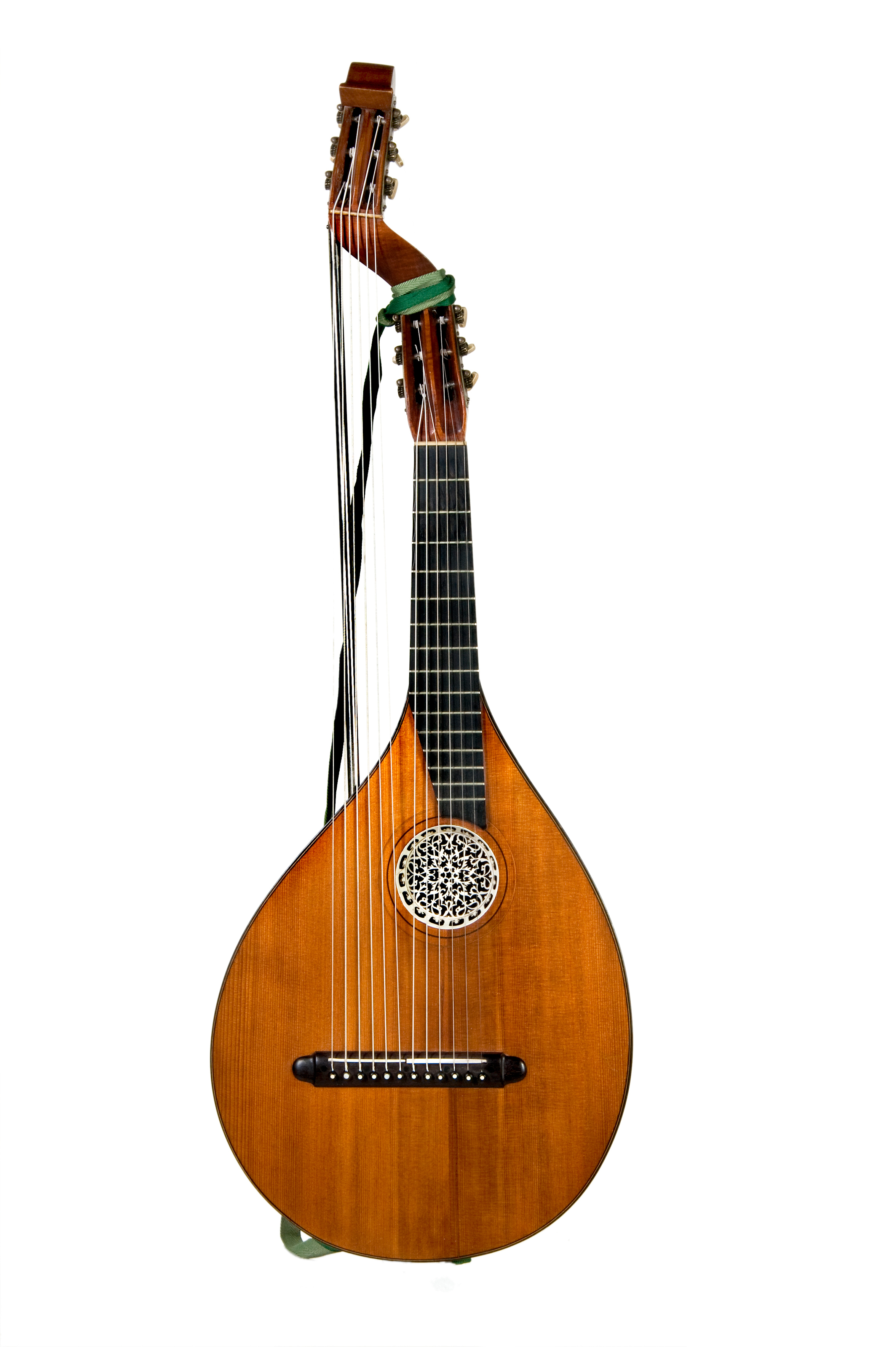 Svenskluta, tillverkare Alfred Brock, 1931. Foto Mikael Bodner. Ingår i Musik- och teatermuseets instrumentsamling.